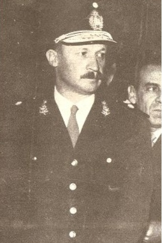 Gral. Juan Carlos Onganía. 23 de mayo de 1963. Revista Primera Plana. Azules y Colorados